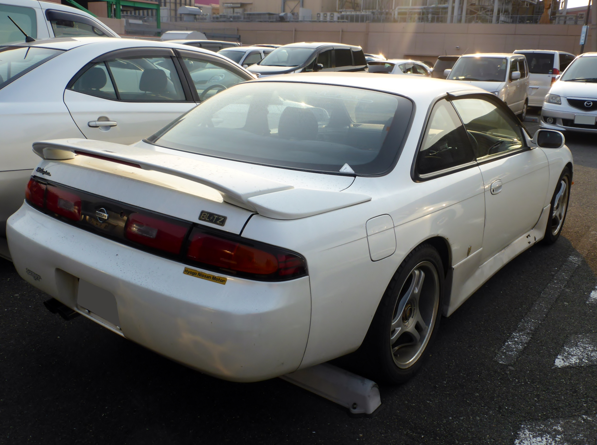 チューニングされたS14前期型日産・シルビアQ'sをリアから撮影。